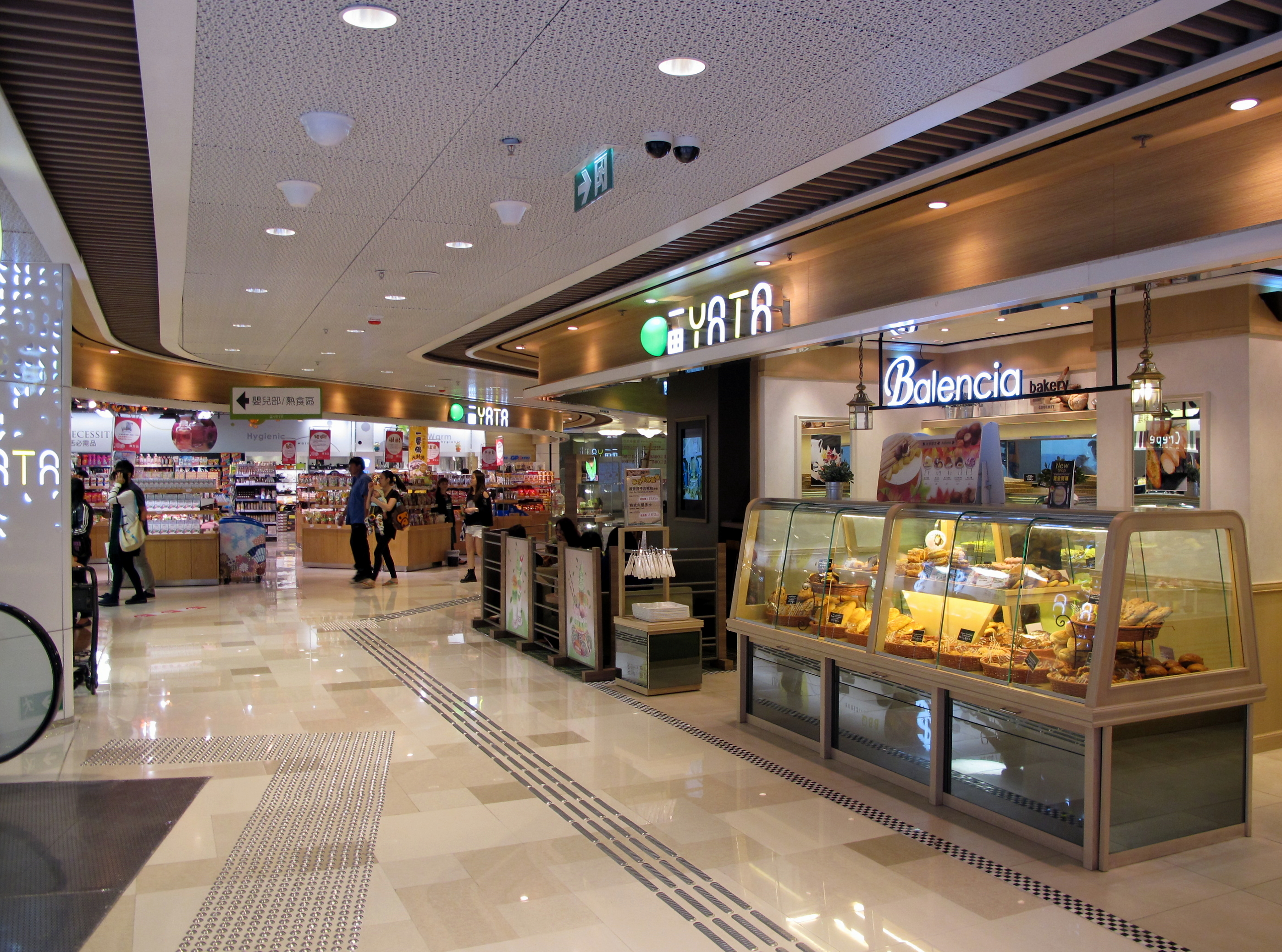 Yata Supermarket in V City